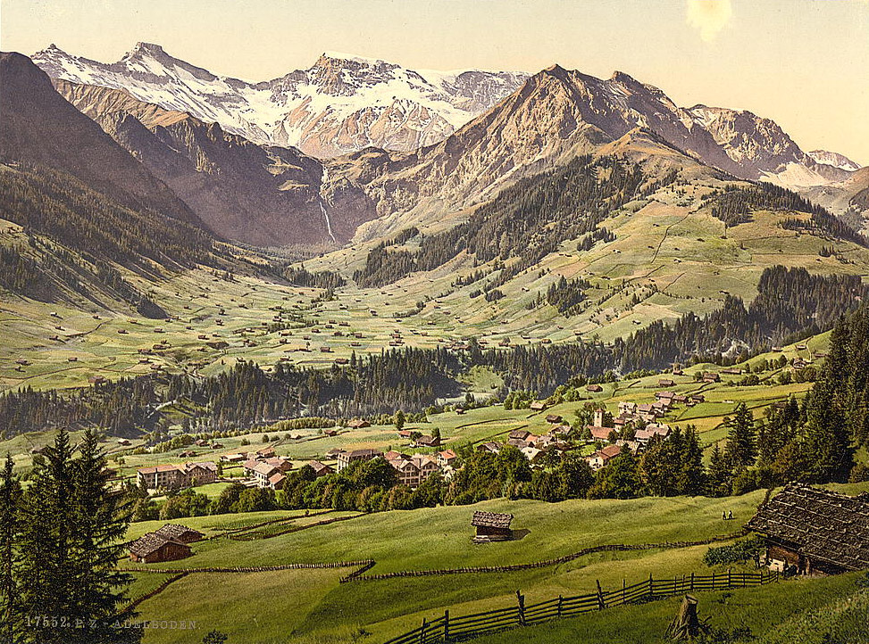 Immagine di Adelboden agli inizi del '900